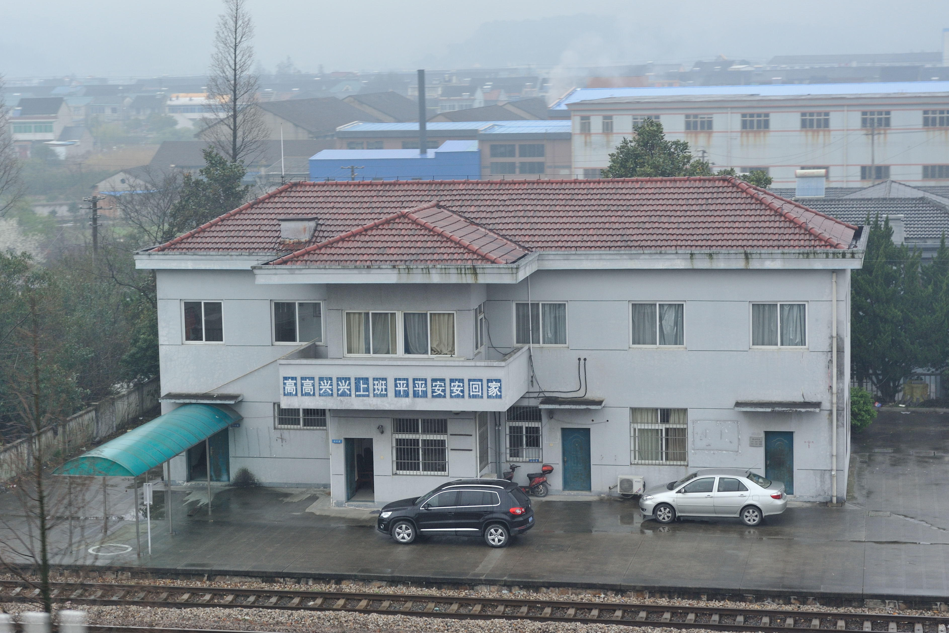 北仑铁路宝幢站站房